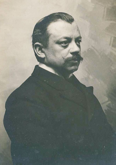 Carlo Martinelli è stato nominato cavaliere e Ufficiale dell'Ordine della Corona d'Italia nel 1912 e commendatore nel 1924. Alla sua morte ha devoluto il suo esteso patrimonio per la fondazione di un ente benefico per la cura prima dei tubercolotici e poi degli anziani in situazioni di disagio, eretto in ente morale nel 1932 e tuttora operante come Fondazione Ricovero Martinelli - Onlus. È stato consigliere comunale dal 1895, sindaco di Balsamo dal 1899 al 1914 e dal 1923 al 1926 e quindi podestà dello stesso comune nel 1926.